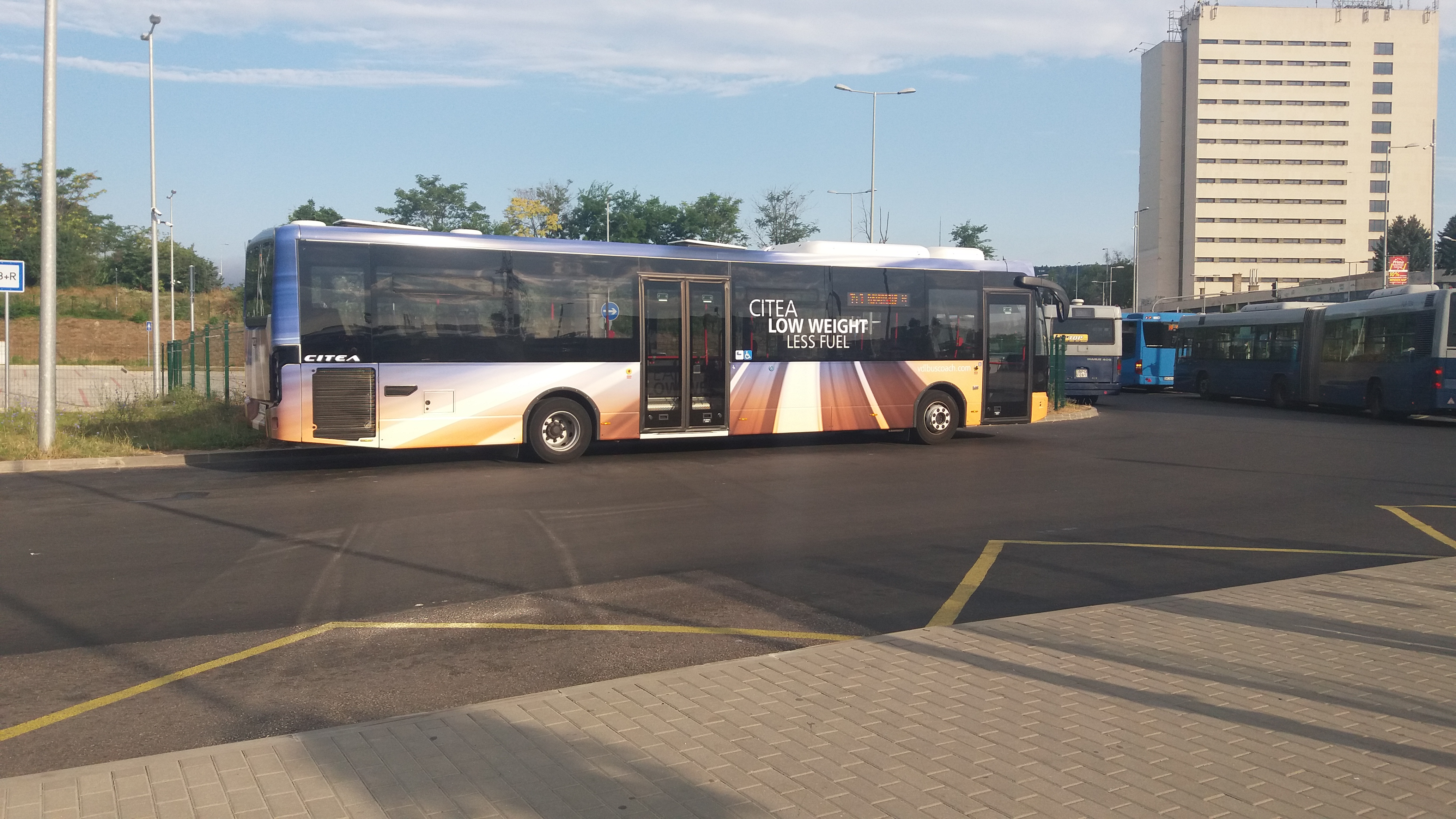 Kelenföld vasútállomás autóbusz-végállomás (Őrmező)